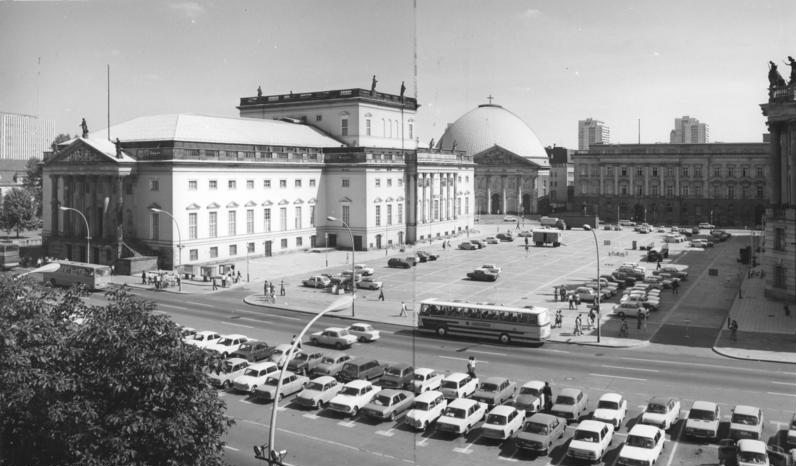 ADN-ZB/Zimmermann/6.12.1979 Der Bebel-Platz mit Deutscher Staatsoper, Hedwigskathedrale und Alter Bibliothek (ganz rechts) 1979 2teiliges Panorama